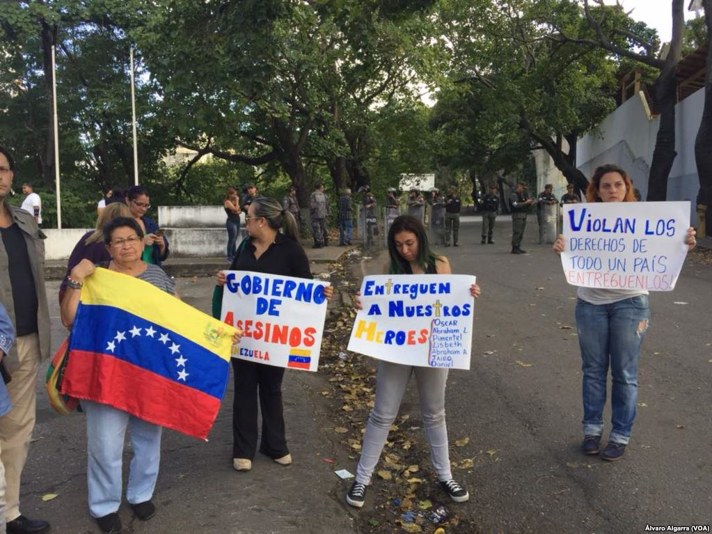 Protestas opositoras sobre el enfrentamiento El Junquito